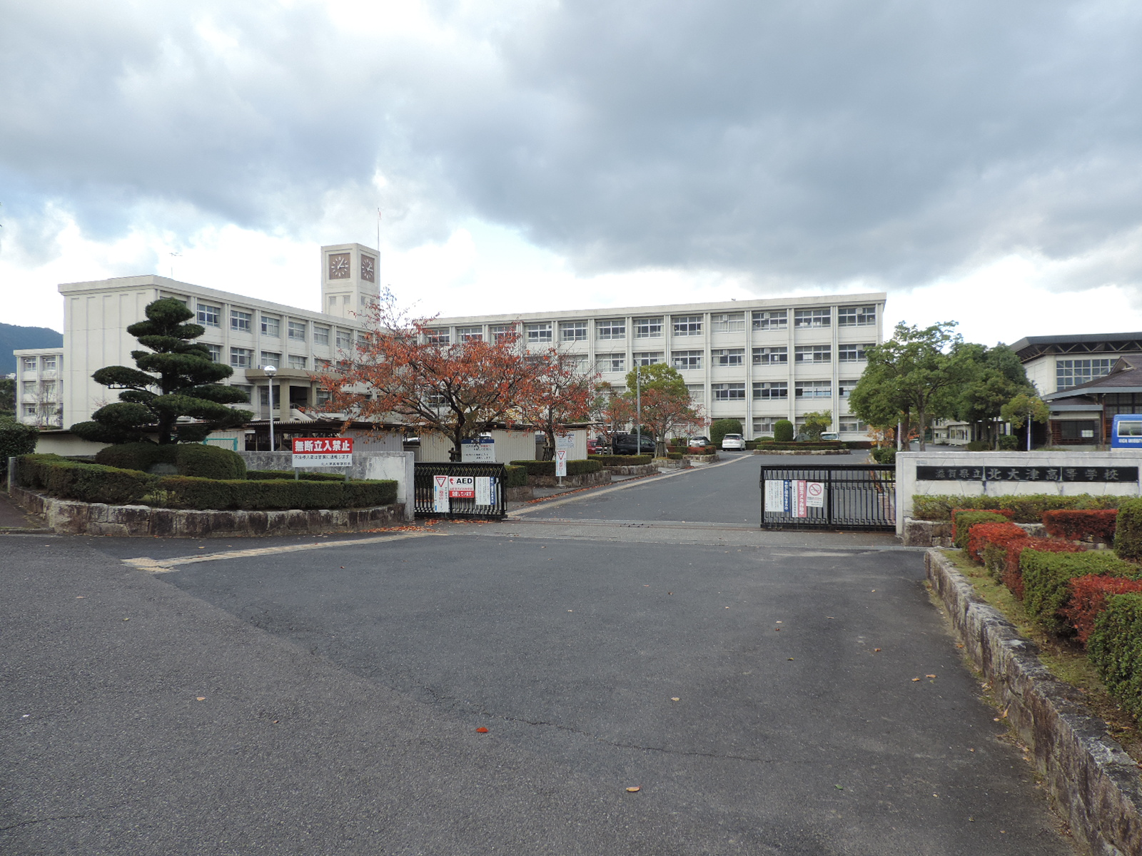 滋賀県立北大津高等学校。2017年撮影